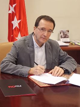 Acuerdo de colaboración firmado entre la Junta Municipal del Distrito y Lomatena Investments